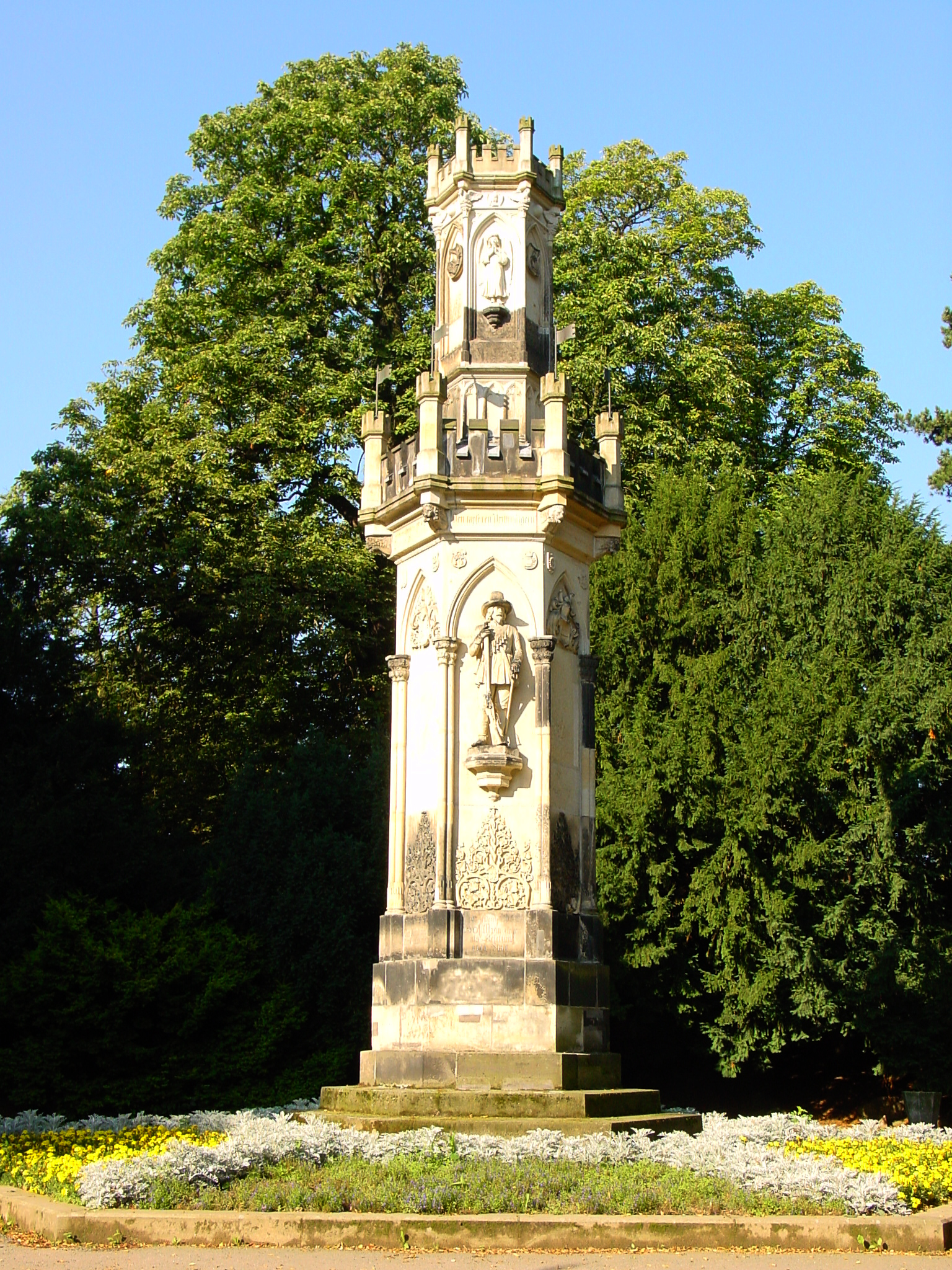 Schwedendenkmal (Entwurf Johann Eduard Heuchler) im Albertpark in Freiberg (Sachsen) 06.08.2002 (foto by geme)